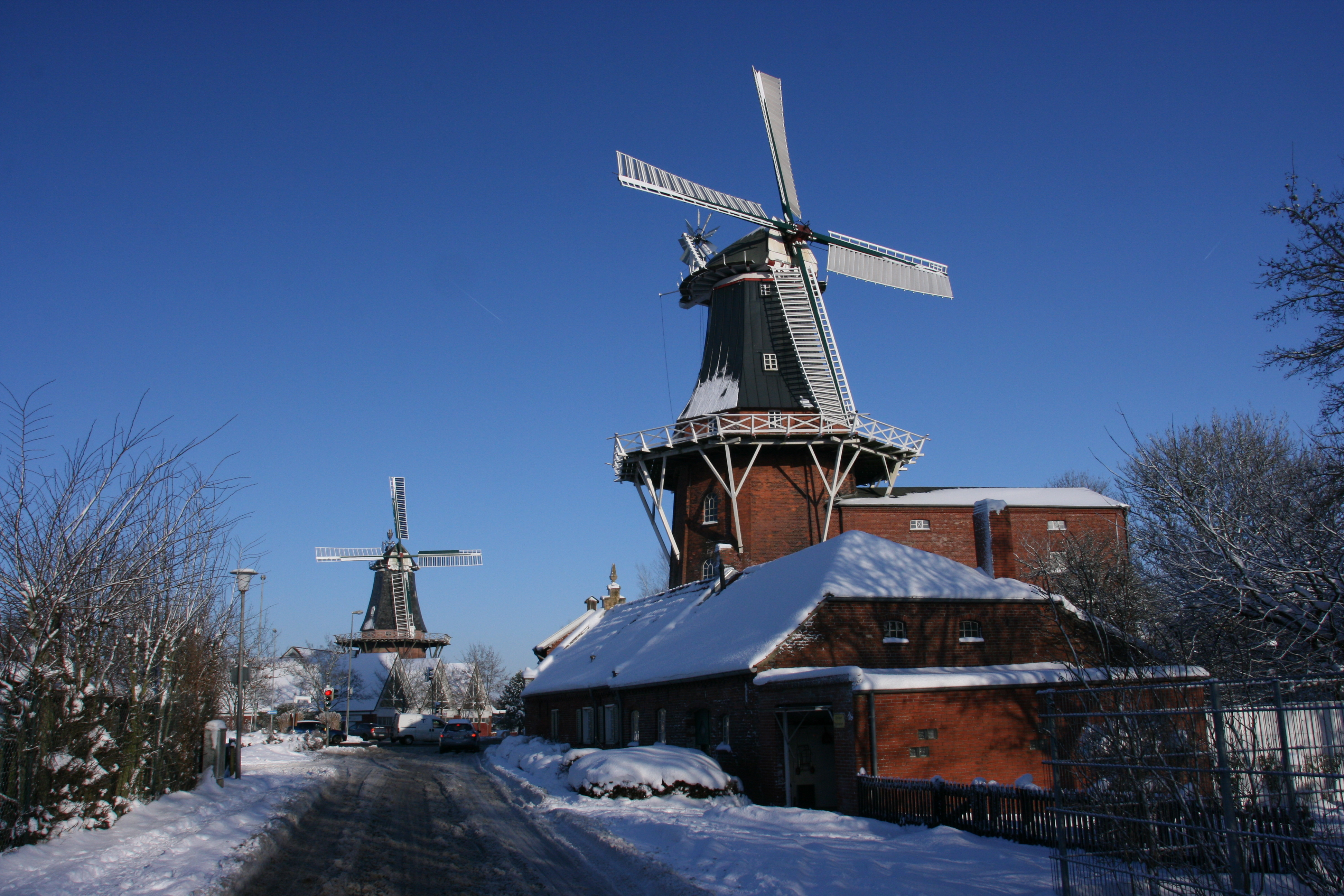 Windmühlen in Norden (Ostfriesland)